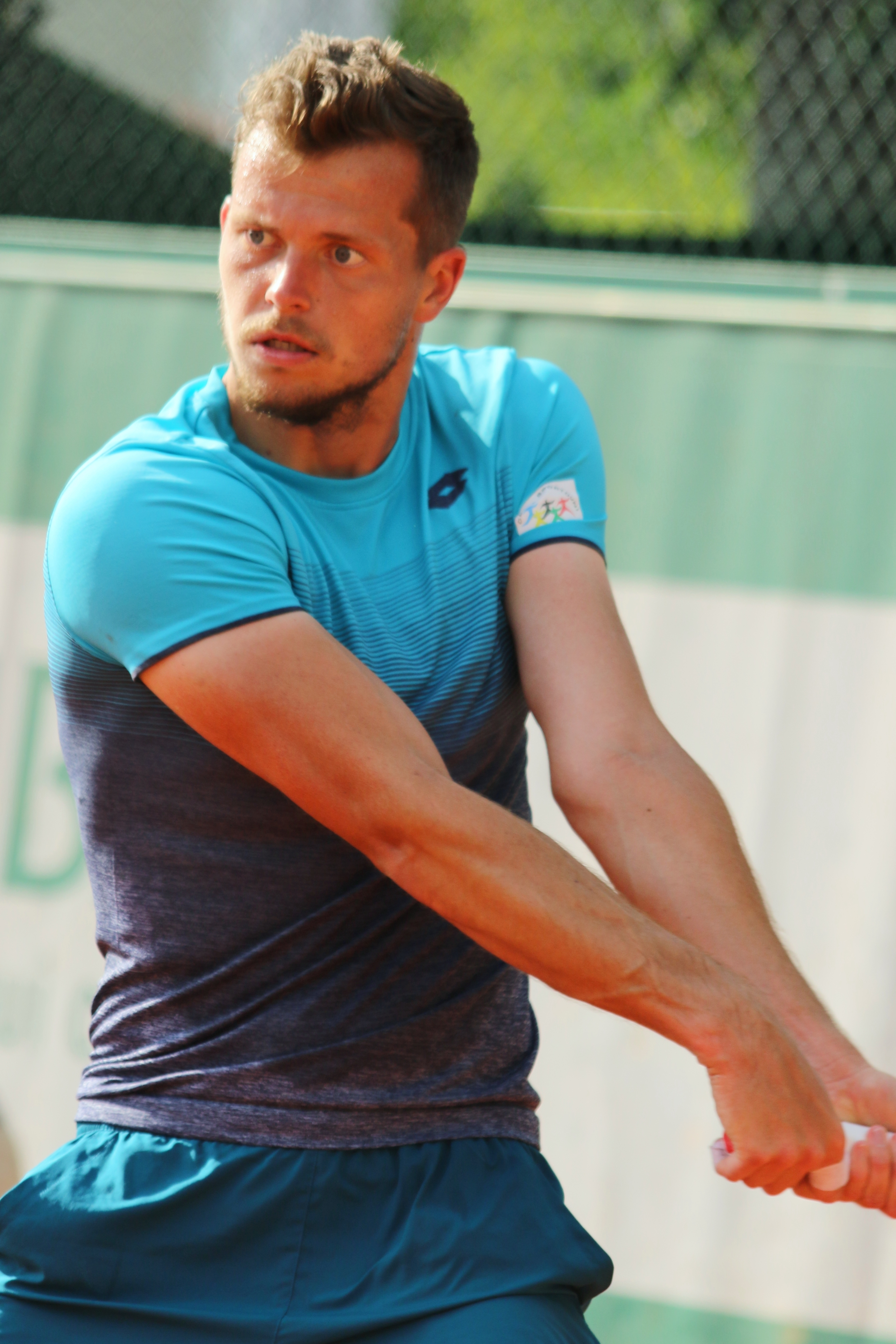 Pavlasek RG18 (18)